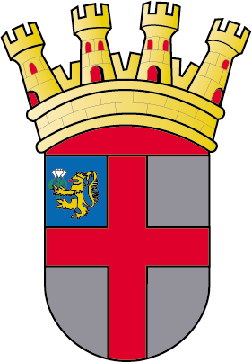 Escudo de armas de Daireaux